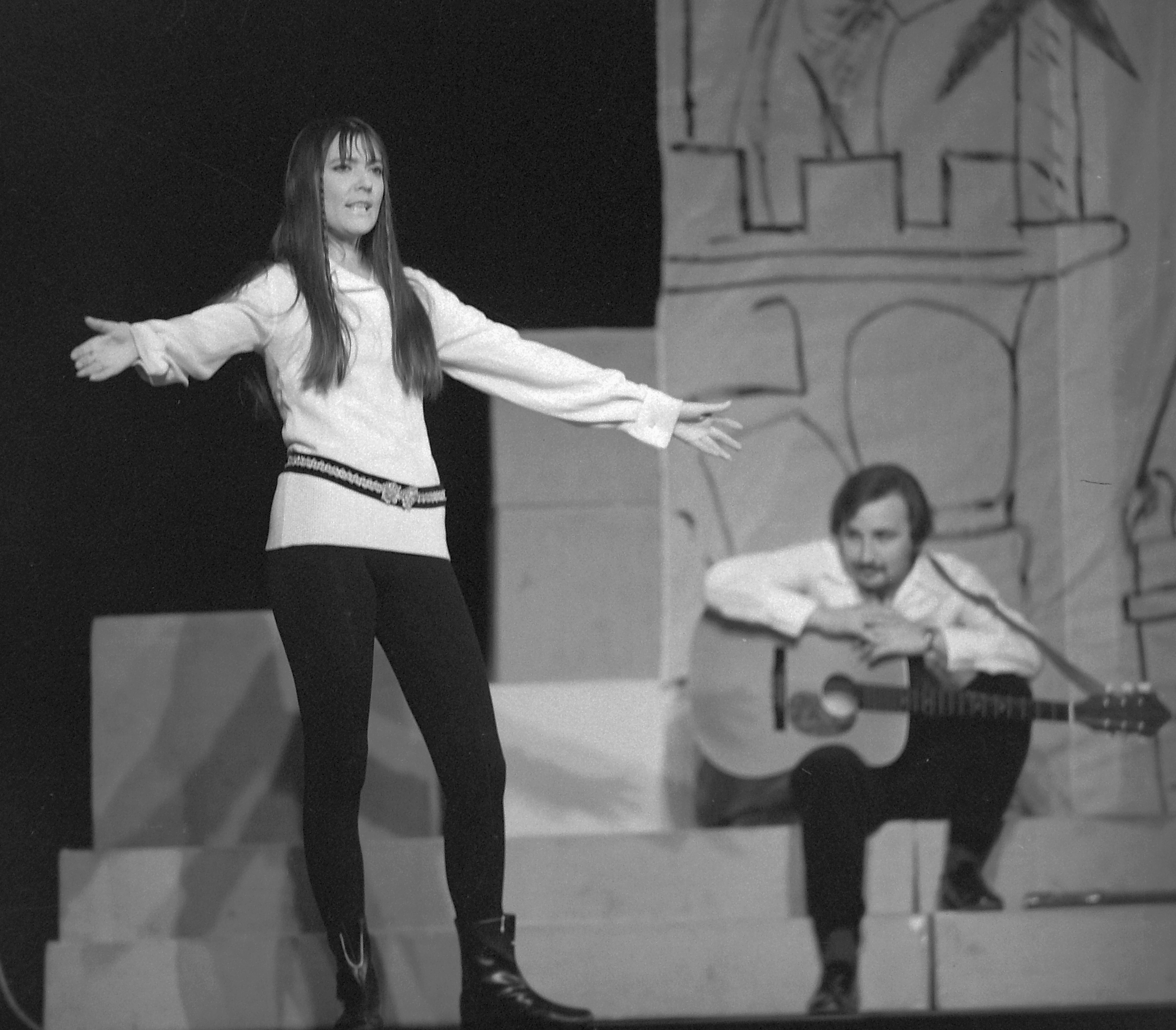 Egyetemi Színpad, Márai Enikő és Mikó István színművészek Location: Hungary, Budapest V. Tags: art of theater, celebrity, actor, Budapest Title: Egyetemi Színpad, Márai Enikő és Mikó István színművészek